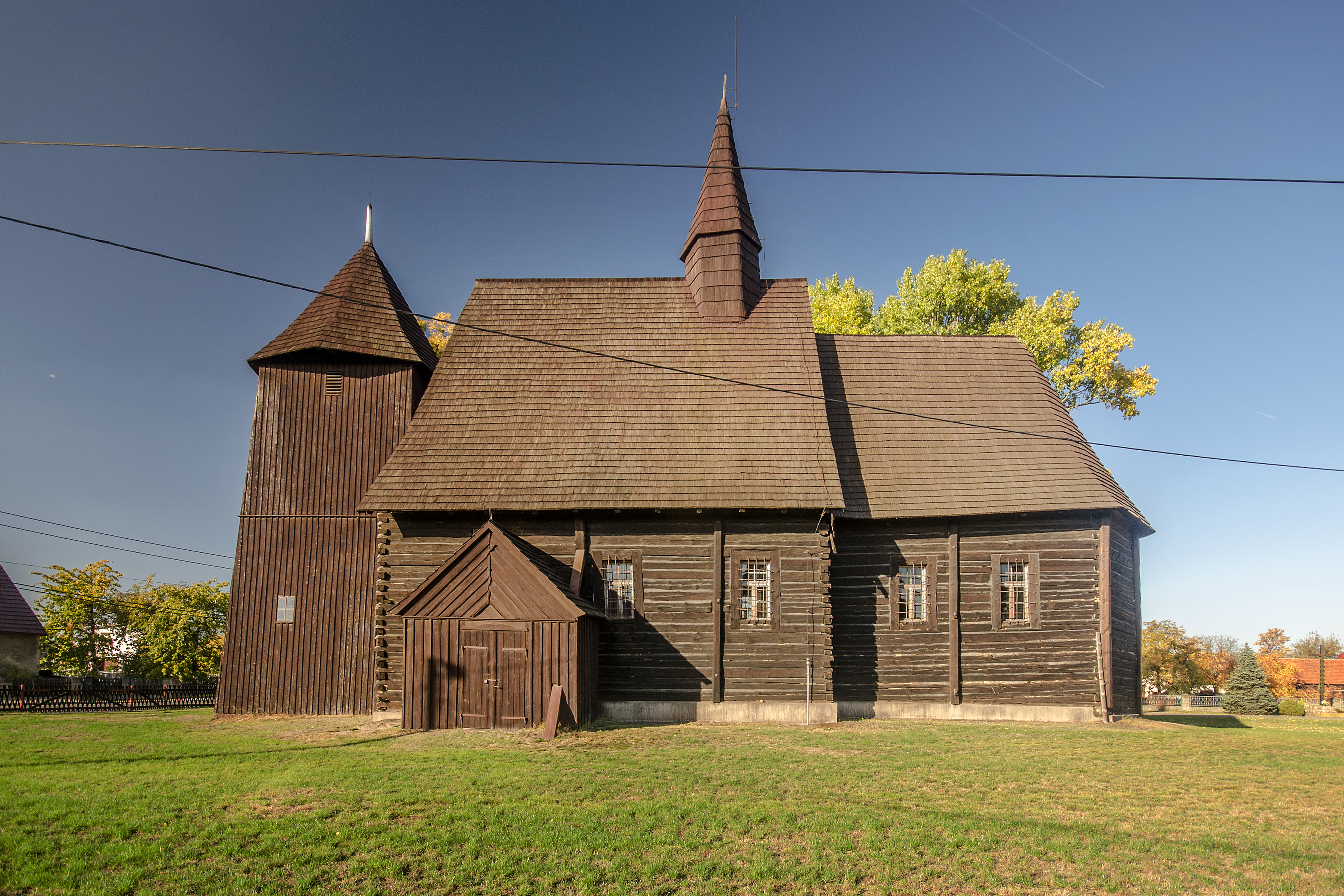 Chocianowice, kościół p.w. Nawiedzenia NMP, 1662